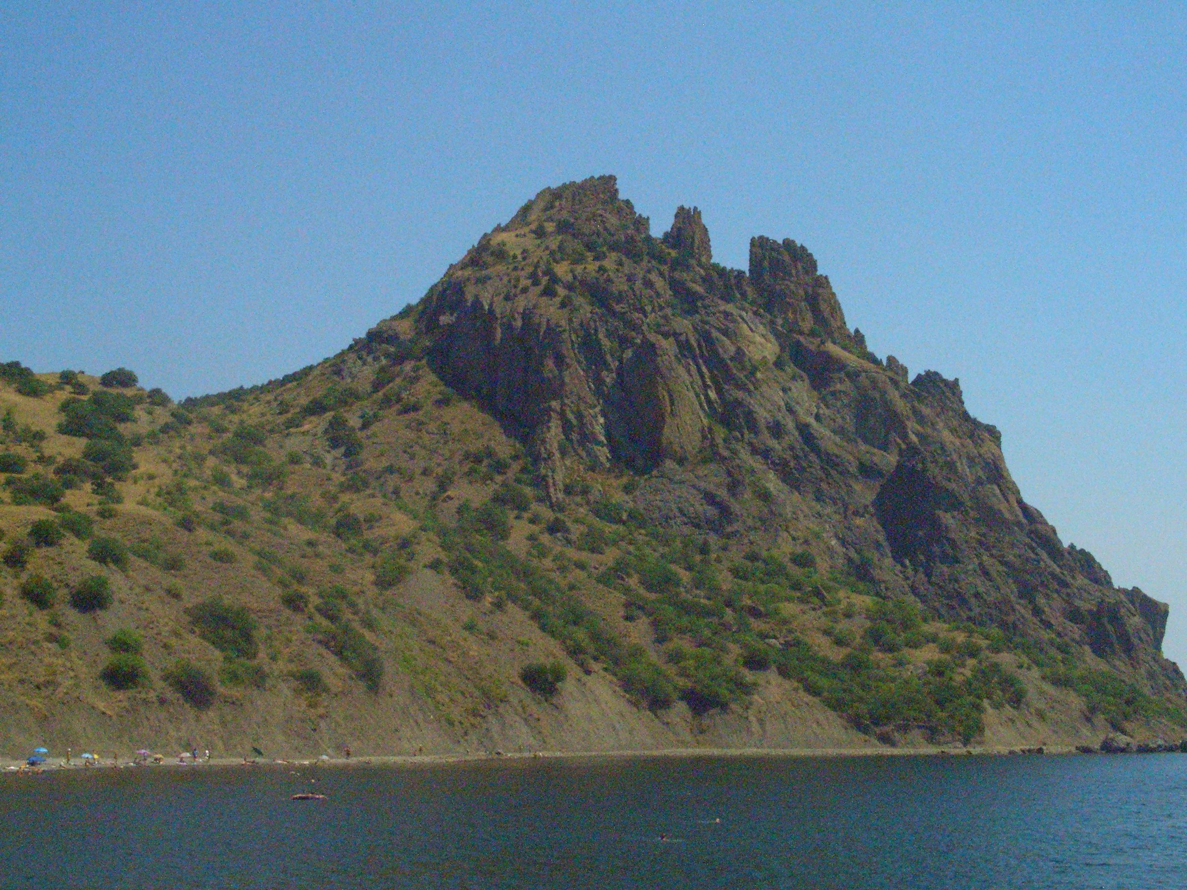 Kara Dag Mountains